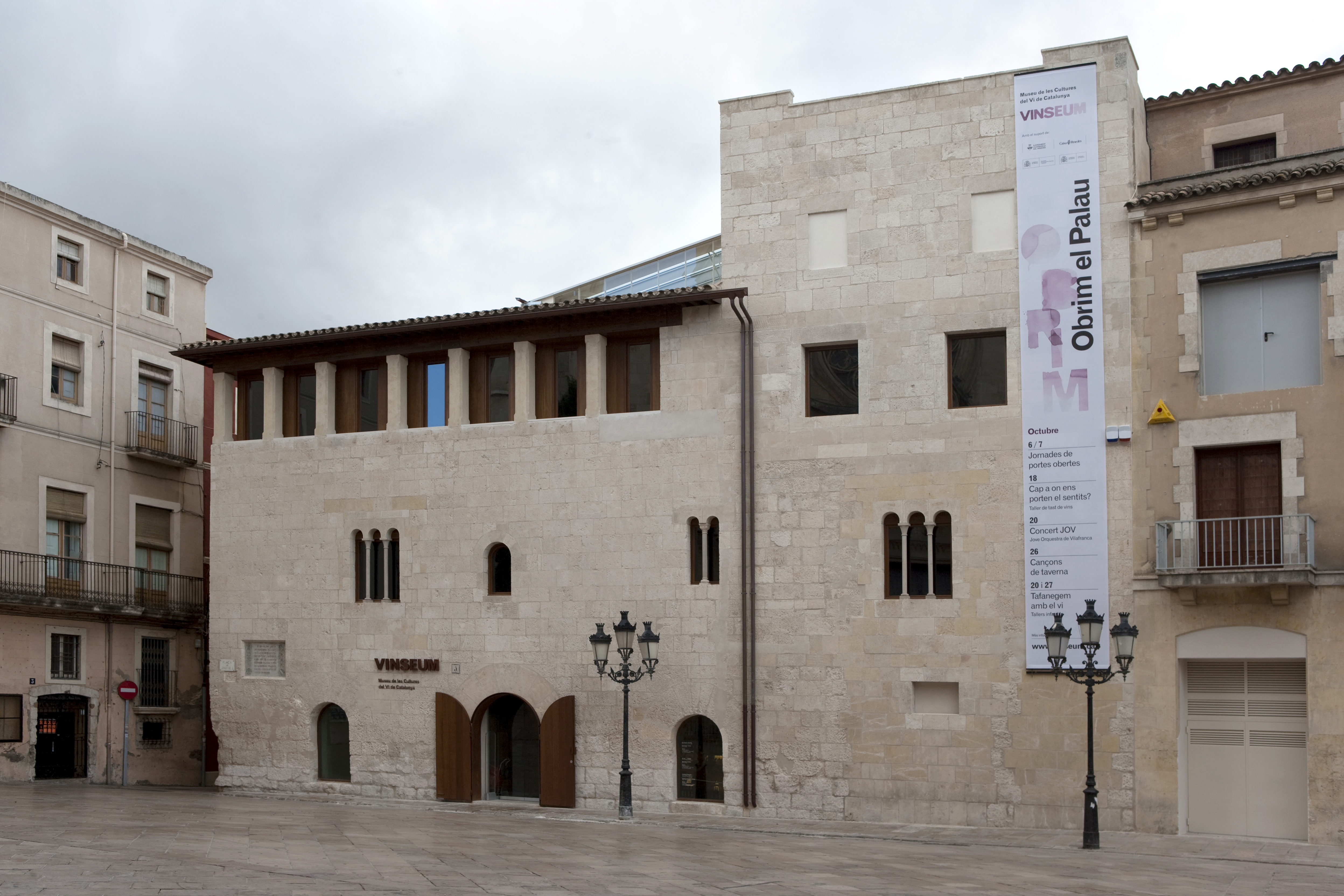 Vista exterior del Palau Reial de Vilafranca del Penedès, seu del VINSEUM Museu de les Cultures del Vi de Catalunya